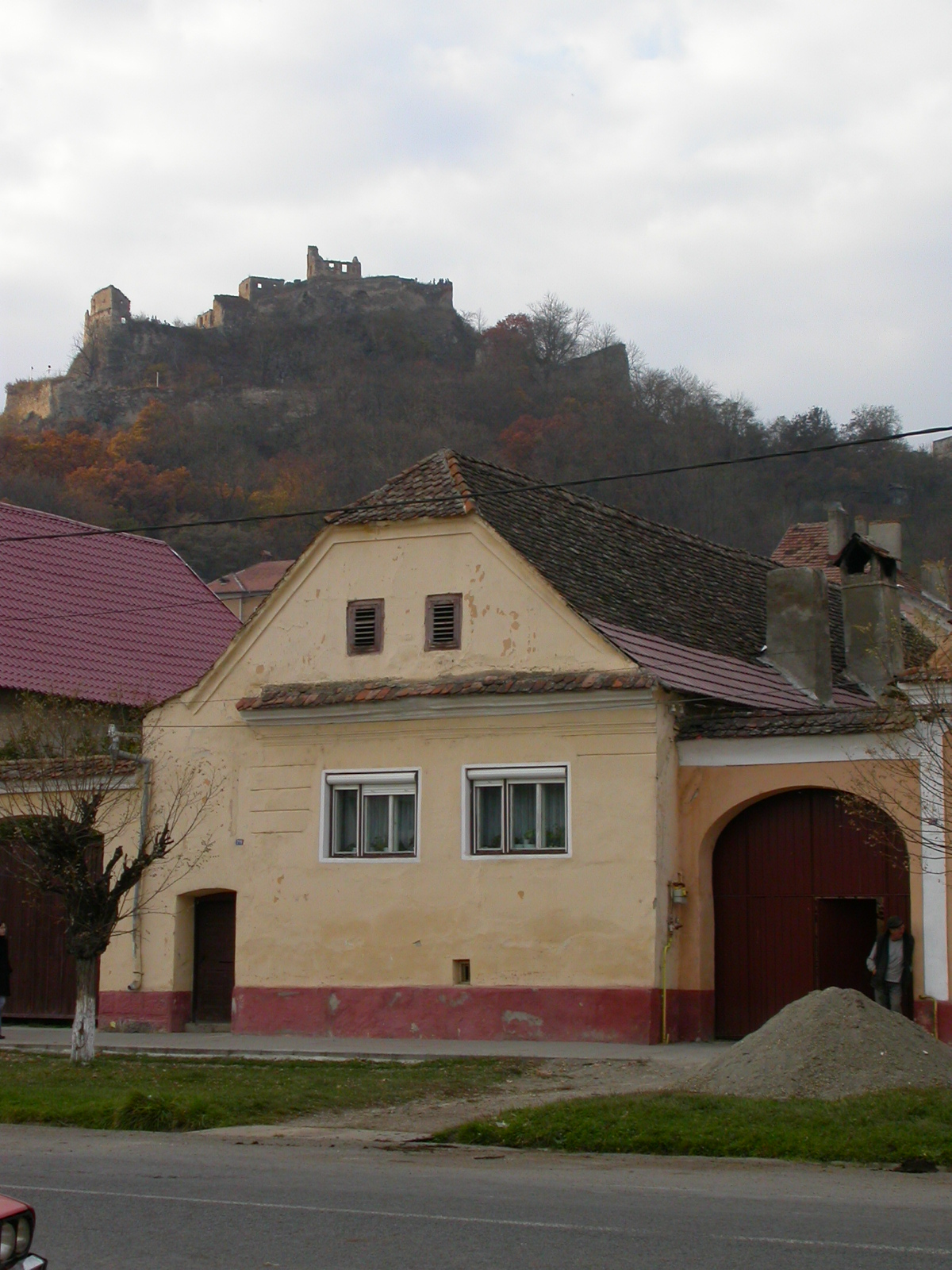 Ansamblul "Str. Republicii" sec. XVIII - XIX